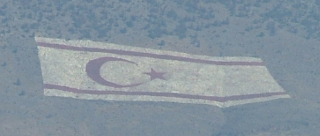 Beşparmak Dağları'nda Kuzey Kıbrıs bayrağı.